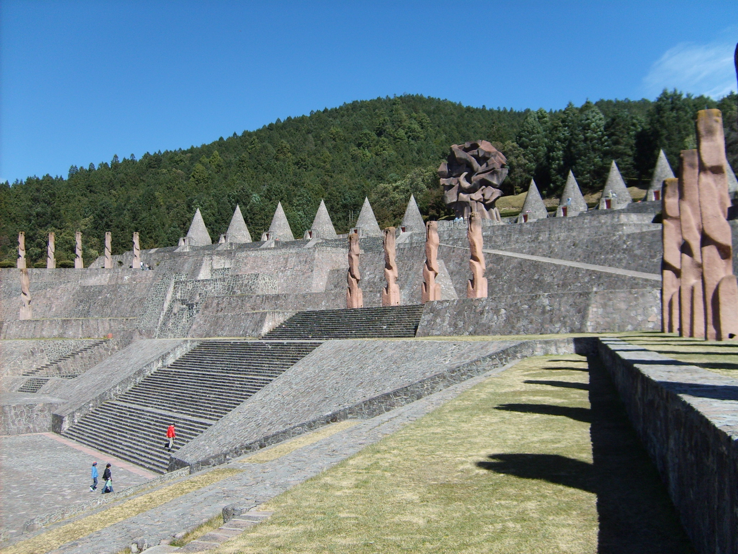 Centro Ceremonial Otomi